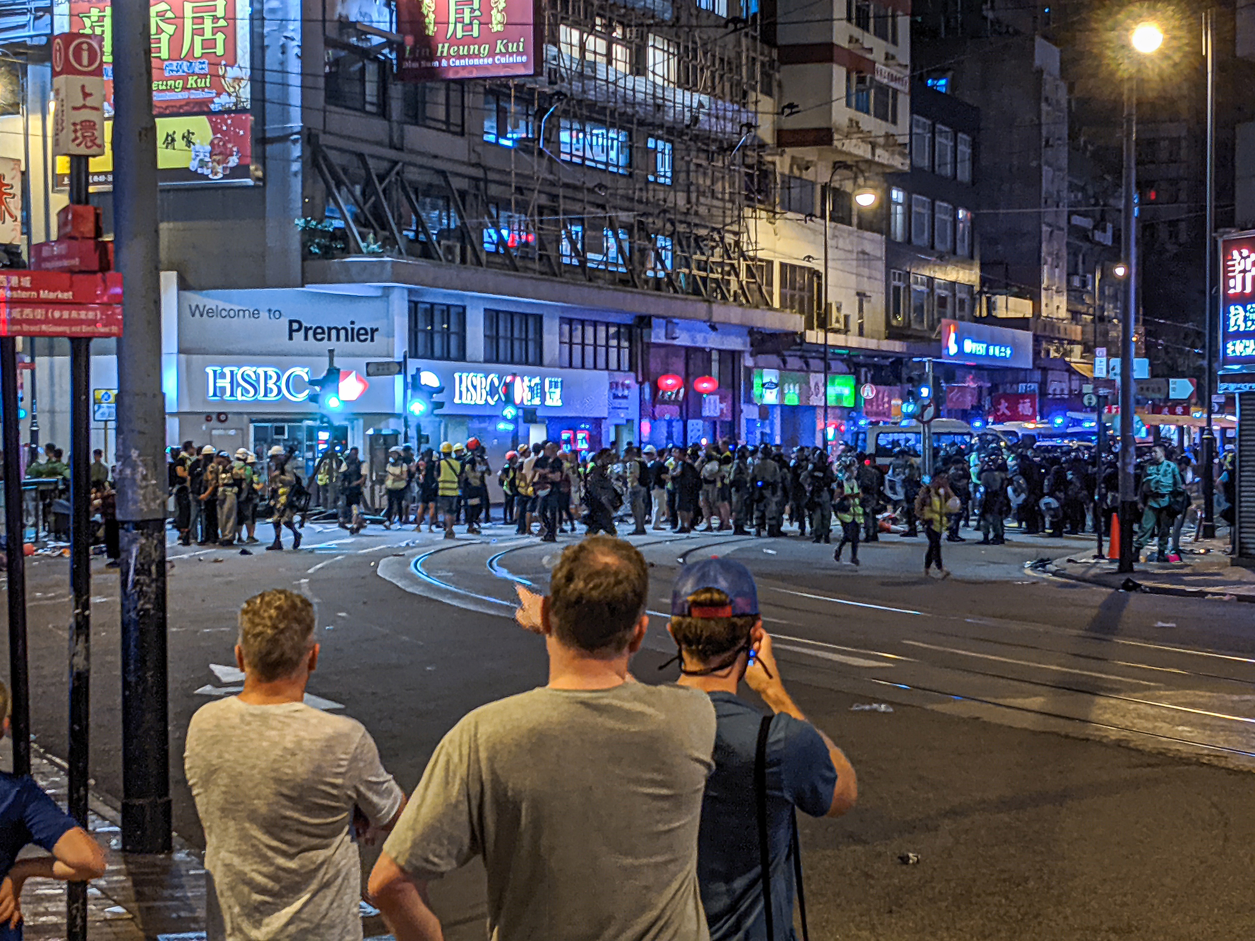 IMG_20190728_202841